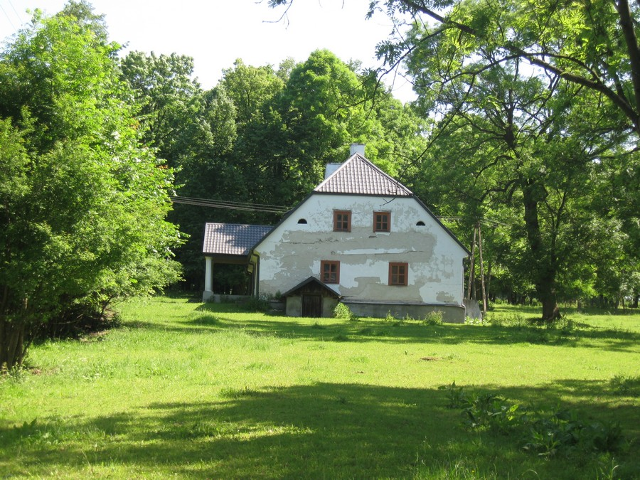 Dwór w Kamiennym Dworze